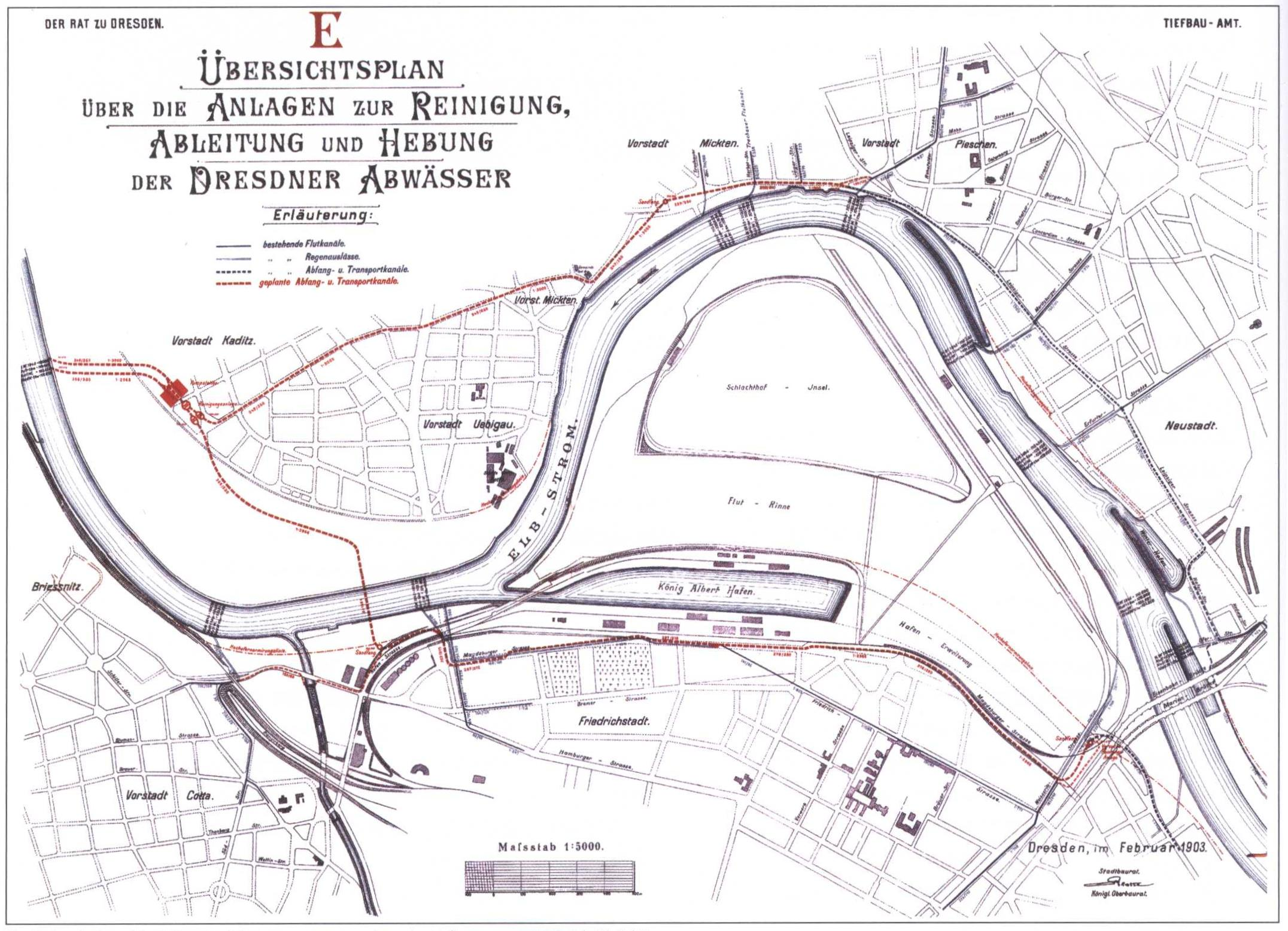 siehe Bildbeschreibung